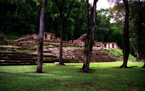 Yaxchilán, Chiapas, México.